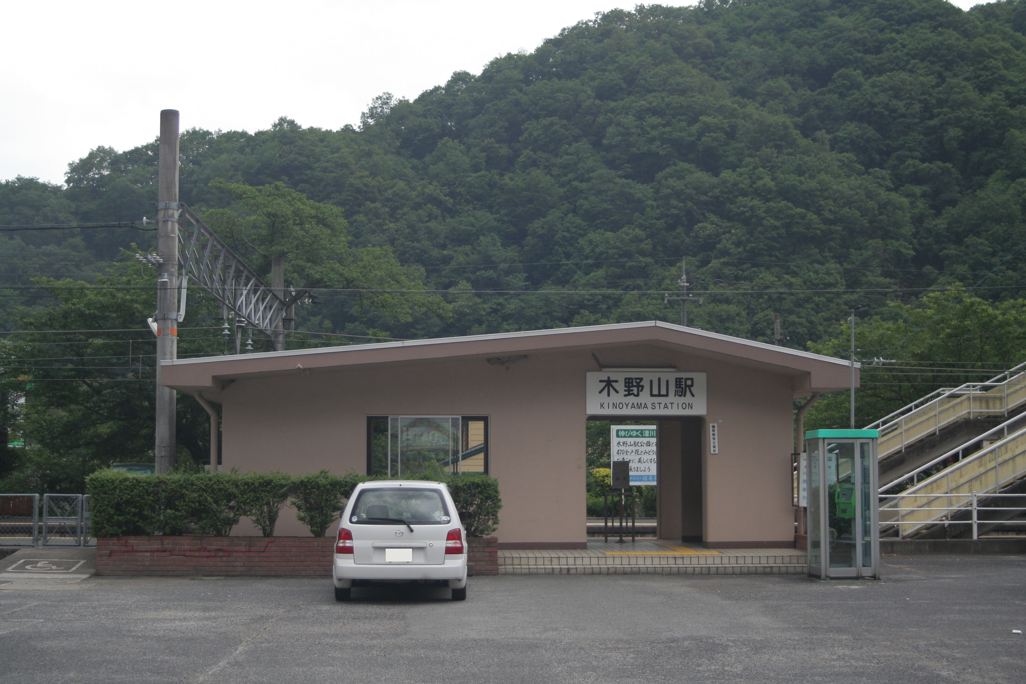 木野山駅の駅舎